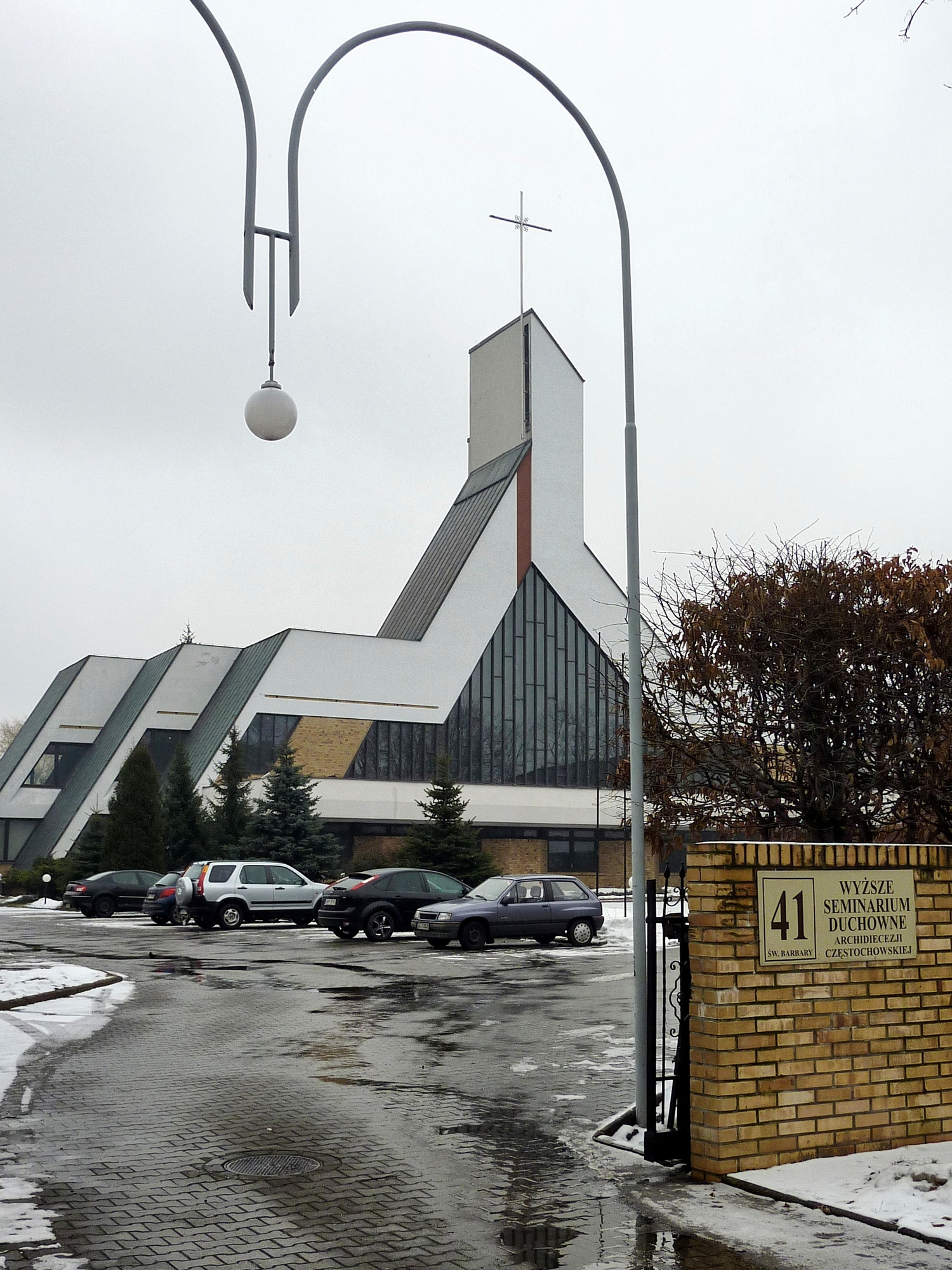 Wyższe Seminarium Duchowne Archidiecezji Częstochowskiej.